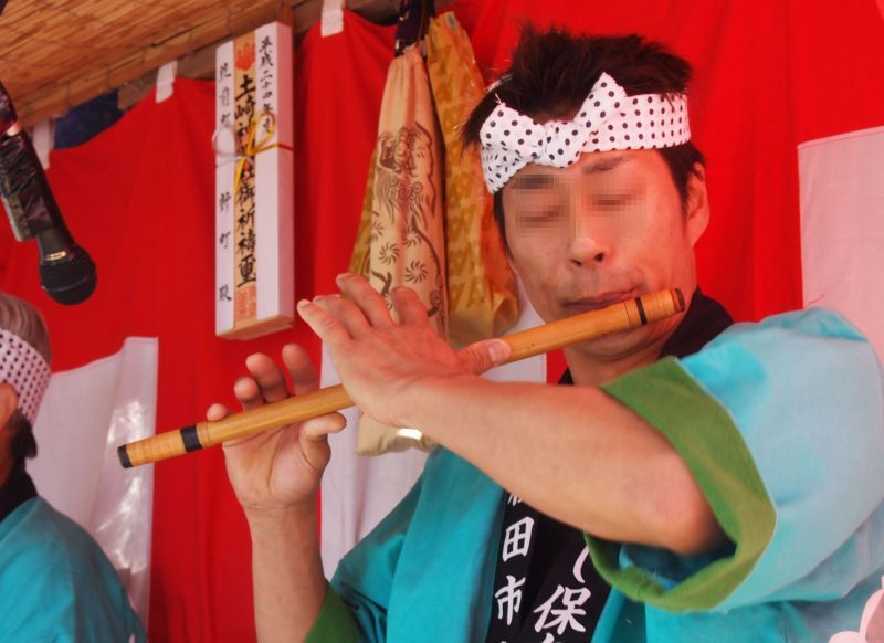 Tsuchizaki-Shinmeisha-Shrine Annual Celebration And The Float Festival (Akita City, Japan)